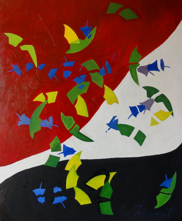 Título: Egipto. Óleo sobre tabla por Ramón Fernández Palmeral.